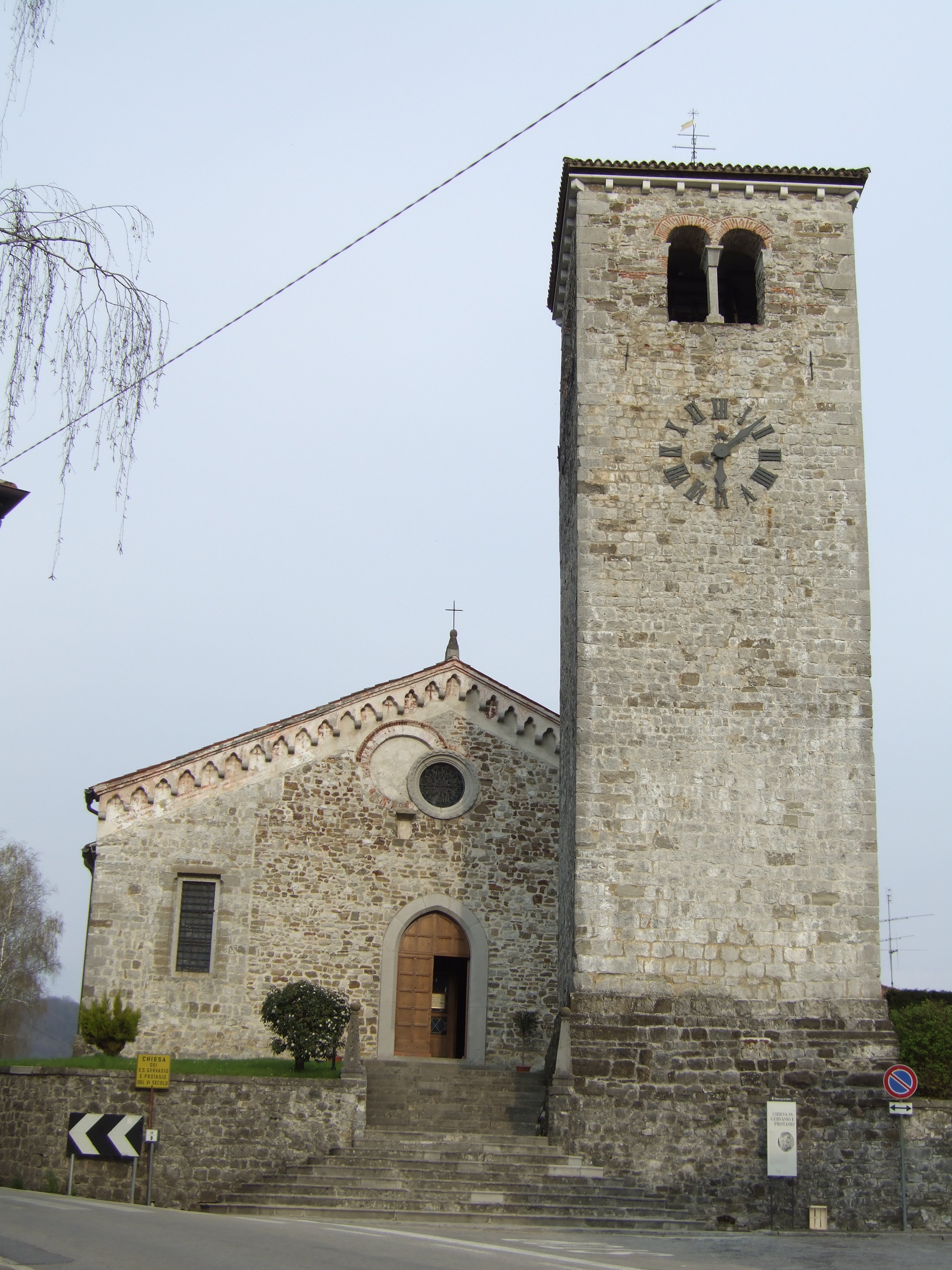 Chiesa dei Santi Gervasio e Protasio - Nimis - provincia di Udine VI secolo